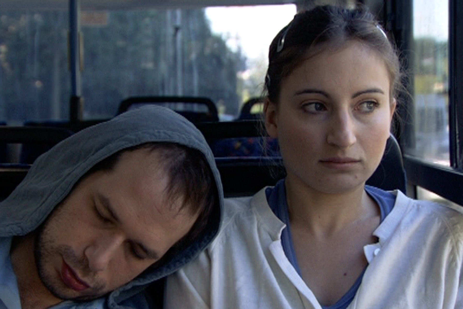 הילה מצקר-הלוי וליאור דורון בסרטו של דרור רשף מי אתה בשבילי משנת 2011